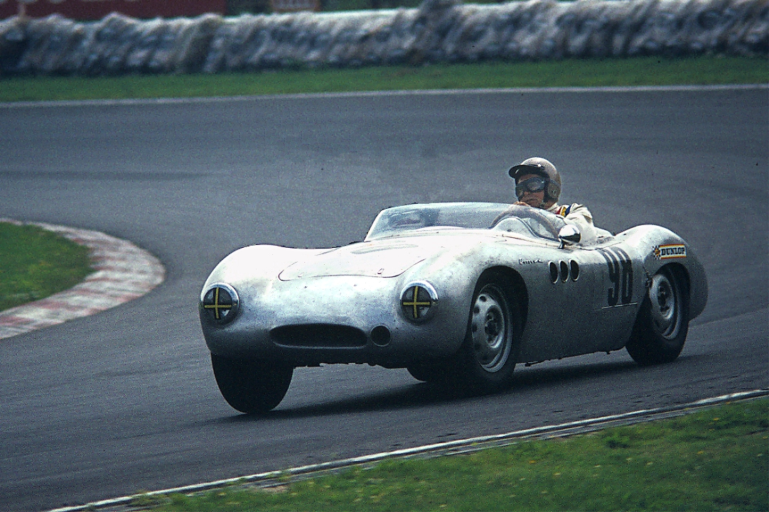 Borgward RS, Baujahr 1954 (laut Angabe im Veranstaltungsprogramm), gefahren von Fritz Jüttner beim AvD-Oldtimer-Grand-Prix. Jüttner war Werksfahrer von Borgward. Baujahr 1954 ist unwahrscheinlich. Mit den drei Lüftungslöchern an der Seite, Windschutzscheibe über die gesamte Breite und nur einem Luftloch vorn müsste es ein Wagen der 6. Generation bzw. Baujahr 1958 sein.